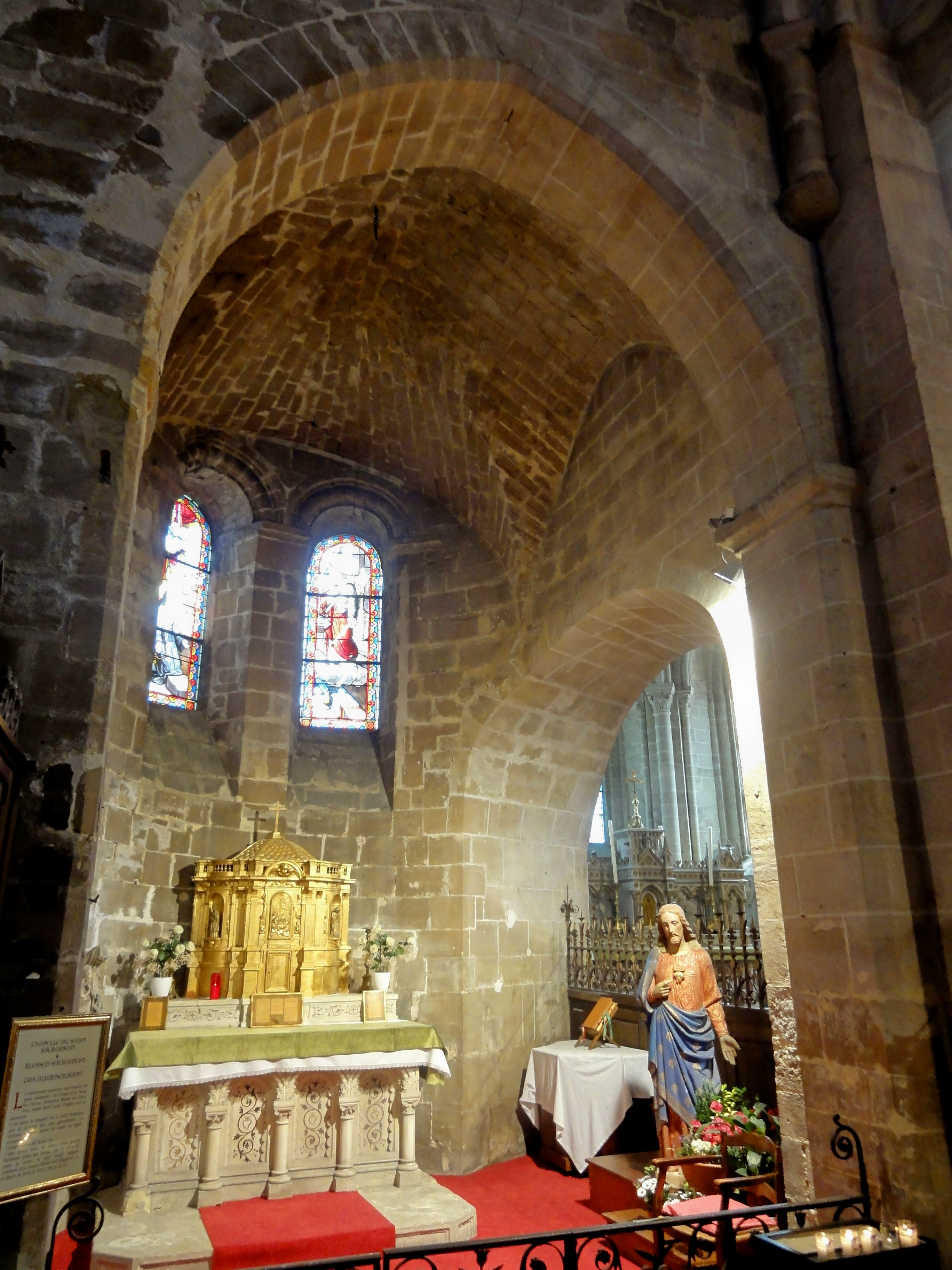 Absidiole romane ; vue dans le chœur.